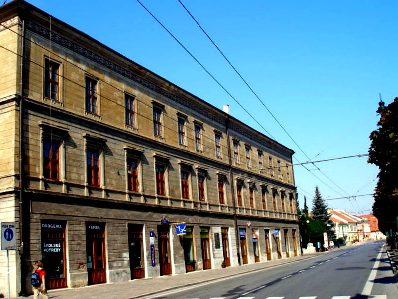 Prešov, budova Evanjelického kolégia. Biskupský úrad Východného dištriktu ECAV.